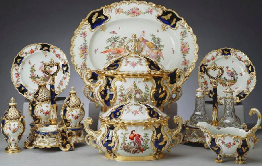 serwis obiadowo deserowy Mecklenburg .Dekoracja w stylu rococo "Mazarine blue"składała się z malowanych ptaków i kwiatów.1758-1765